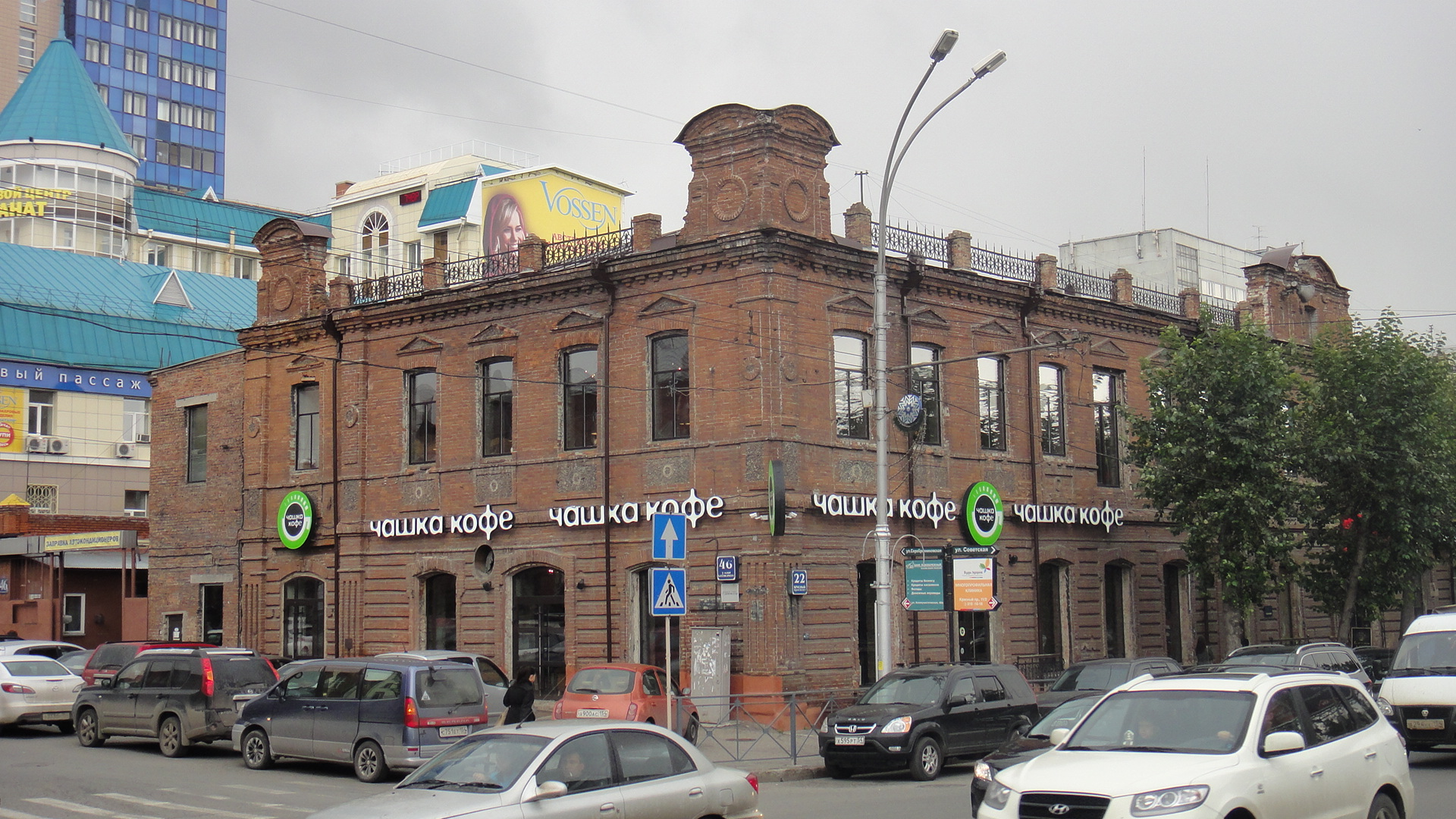 Красный проспект